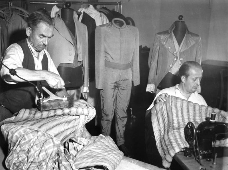 August 1953 Schiller-Theater in Berlin In der Kostümwerkstatt entsteht jedes gewünschte Kostum für die Aufführung.